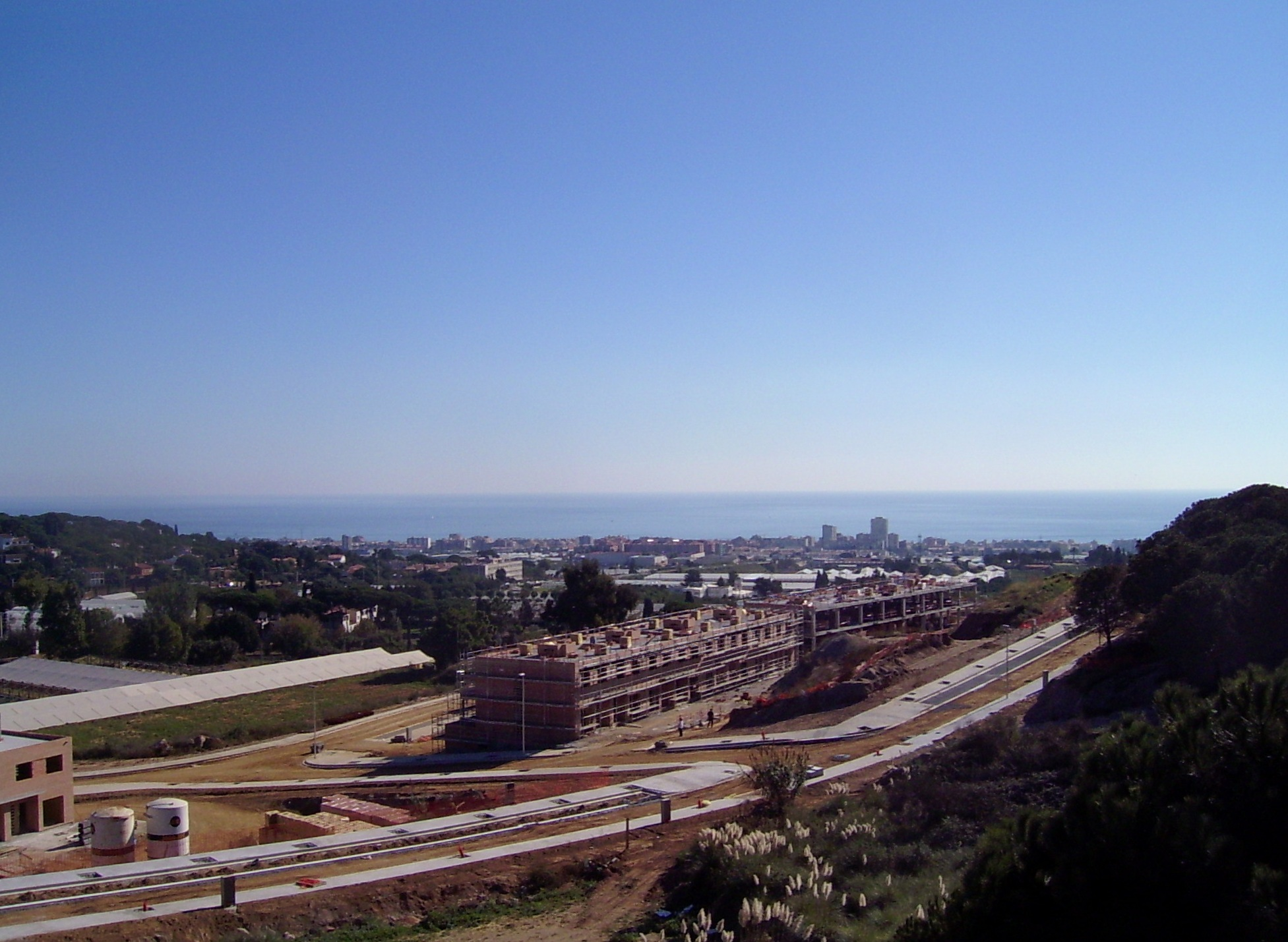 Vilassar de Mar, comarca del Maresme